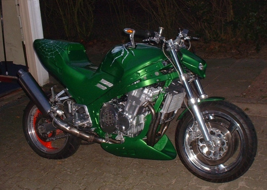 GSX1100F Fighter